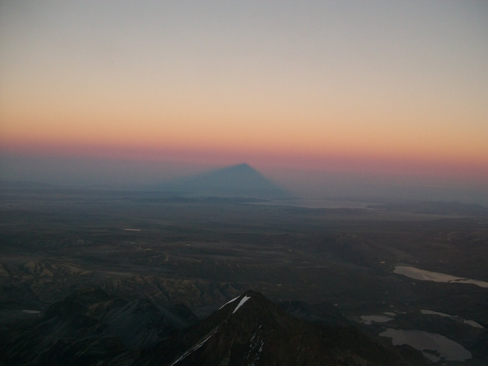 הצל של ההר הואיינה פוטוסי